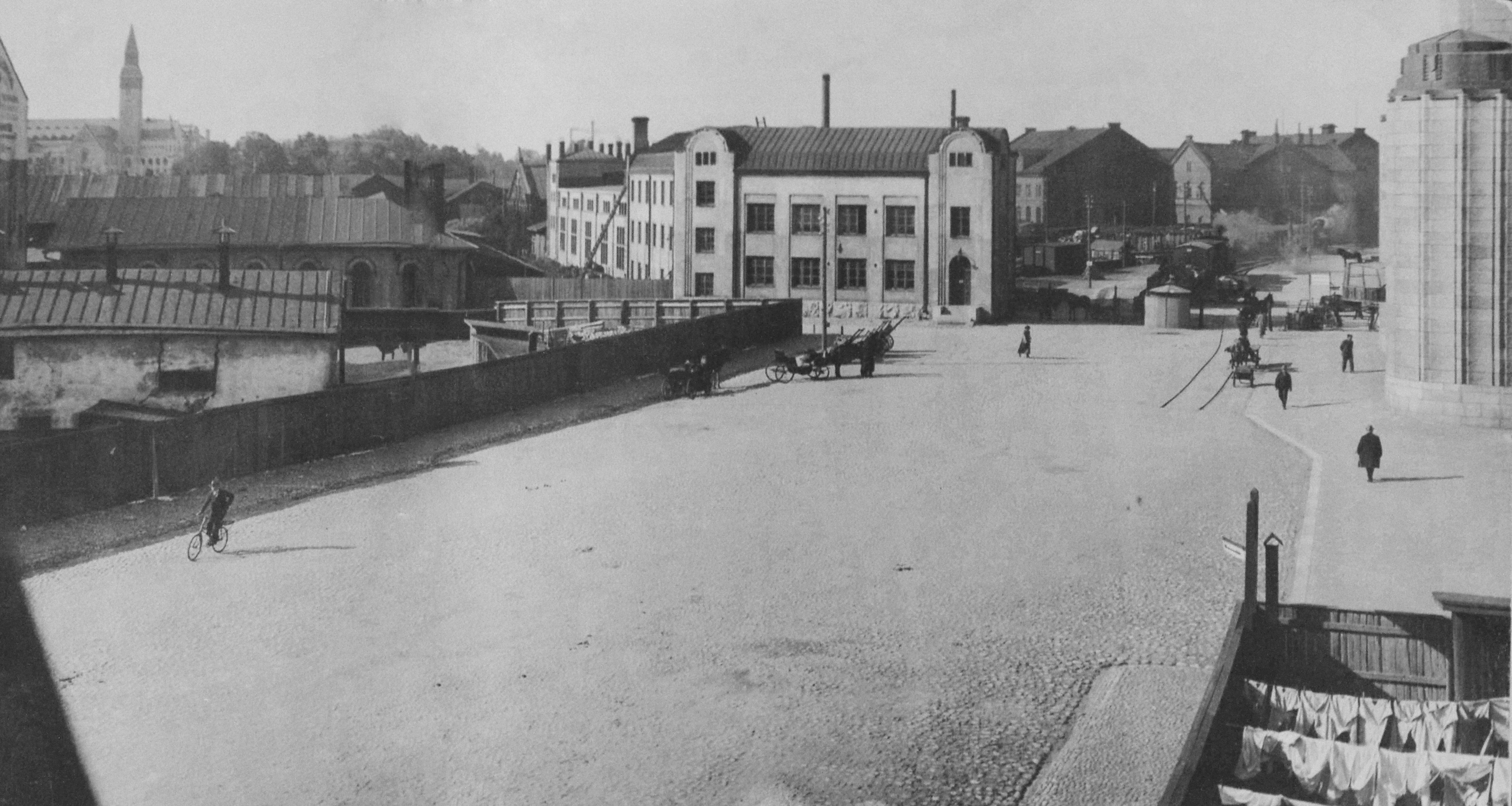 Helsingin rautatieaseman länsipuoleista pihaa 1900-luvun alussa